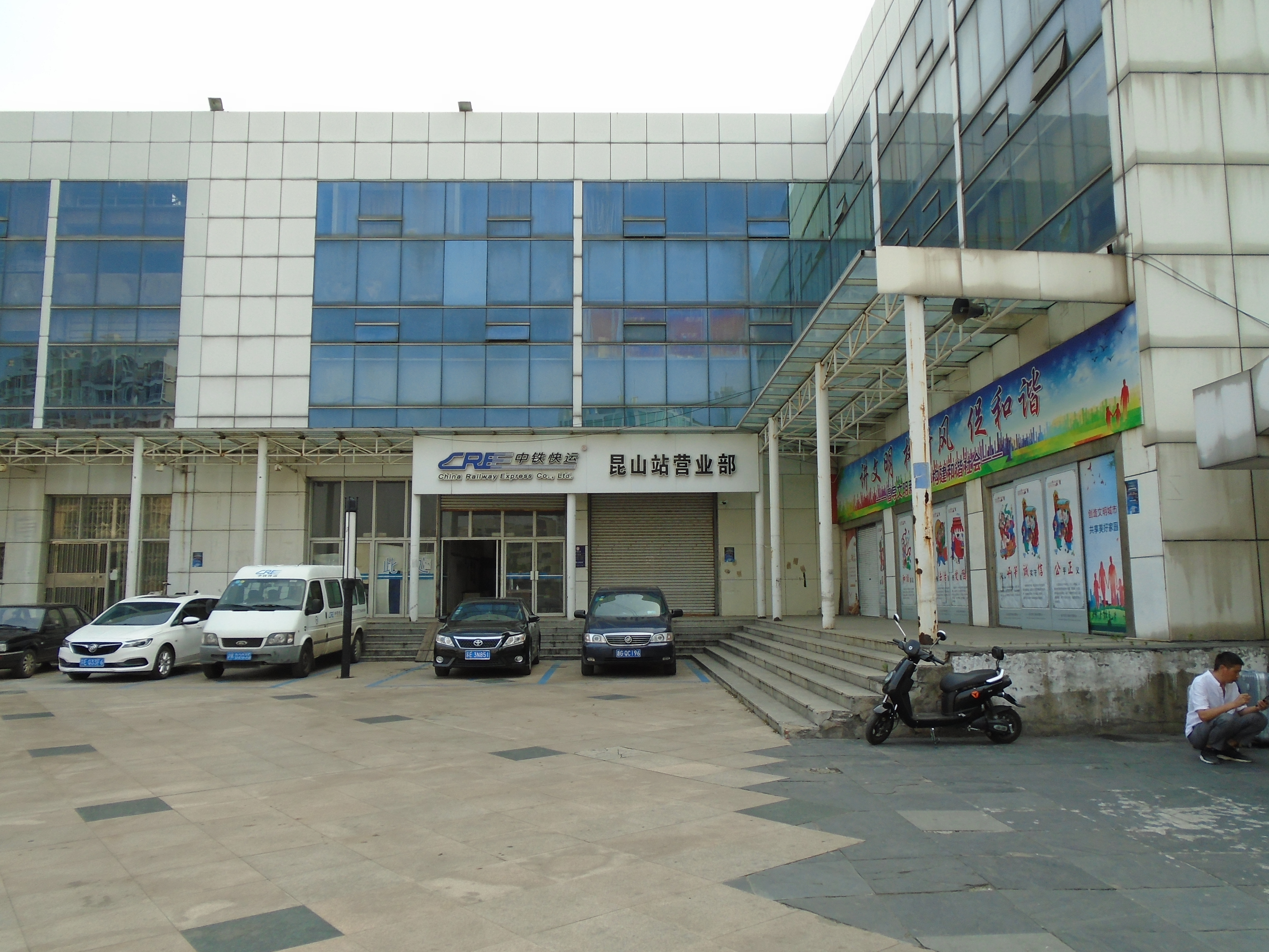 2019年6月的昆山站北广场中铁快运